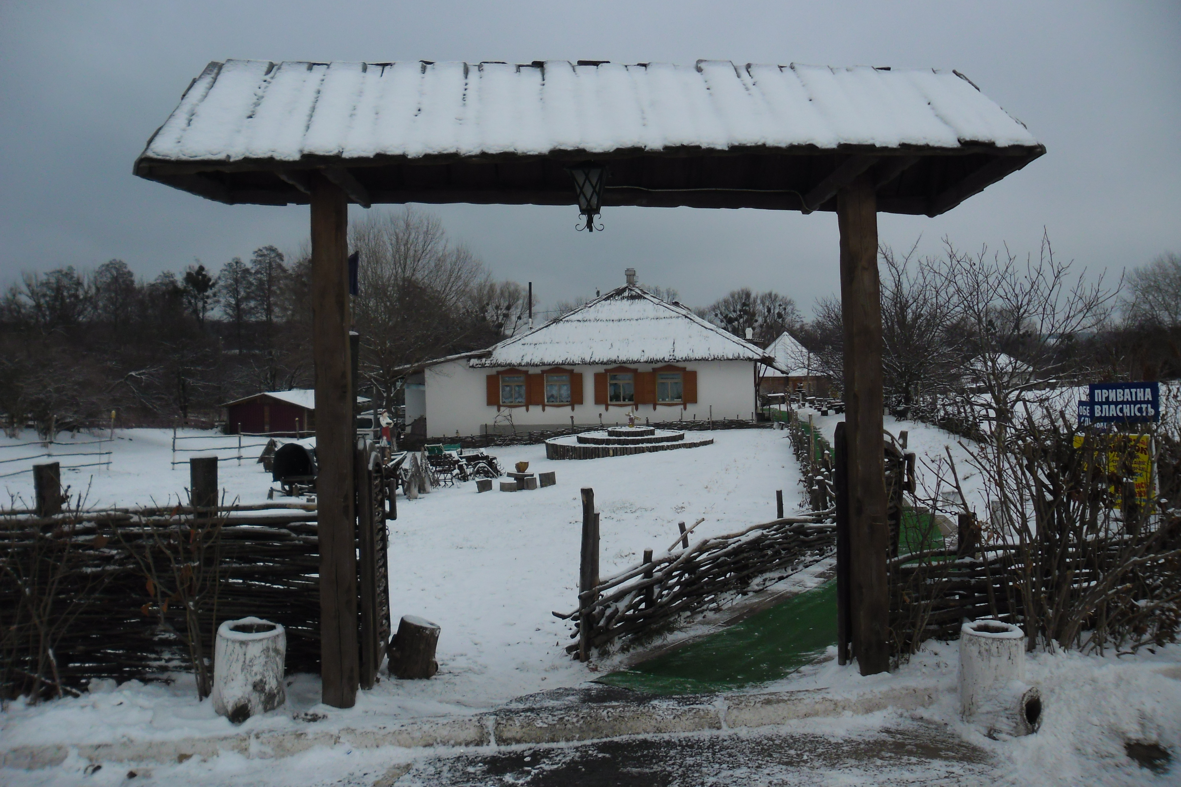 Фото